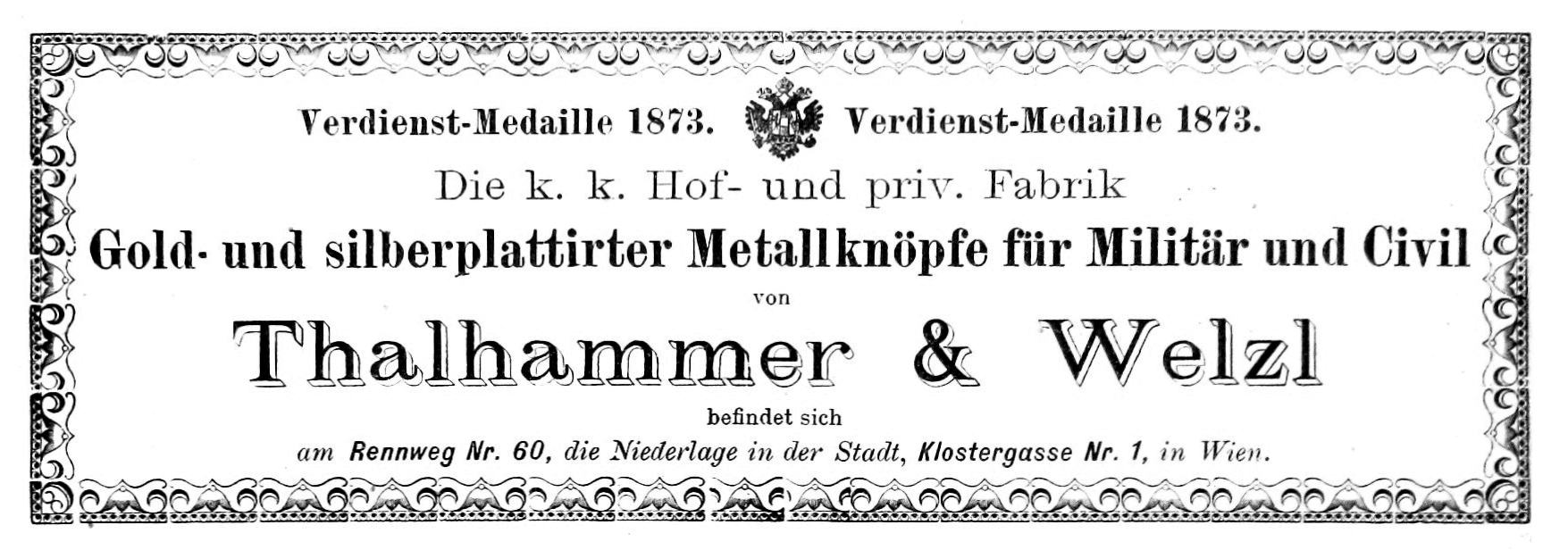 Werbung von Thalhammer & Welzl im Handbuch des Allerhöchsten Hofes und des Hofstaates Seiner K. und K. Apostolischen Majestät für 1891.